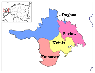 Daghoae municipia Latine